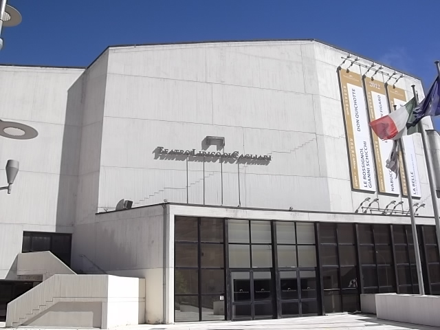 facciata del teatro lirico di Cagliari